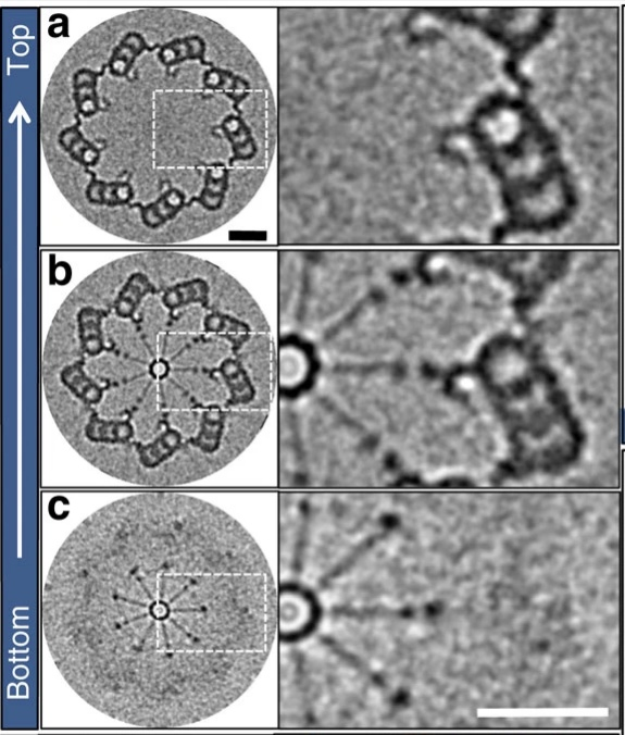 Estremeñu: Figura 1: Arquitectura nativa de la rueda de carro central in vivo. a-c) Imágenes del crio-tomograma de cuerpo probasal de Chlamydomonas, después de la simetrización nueve veces izquierda: tres regiones de arriba a abajo del centriolo, dederecha: las regiones insertas en caja vistas con aumento. Barra de escala= 50 nm.